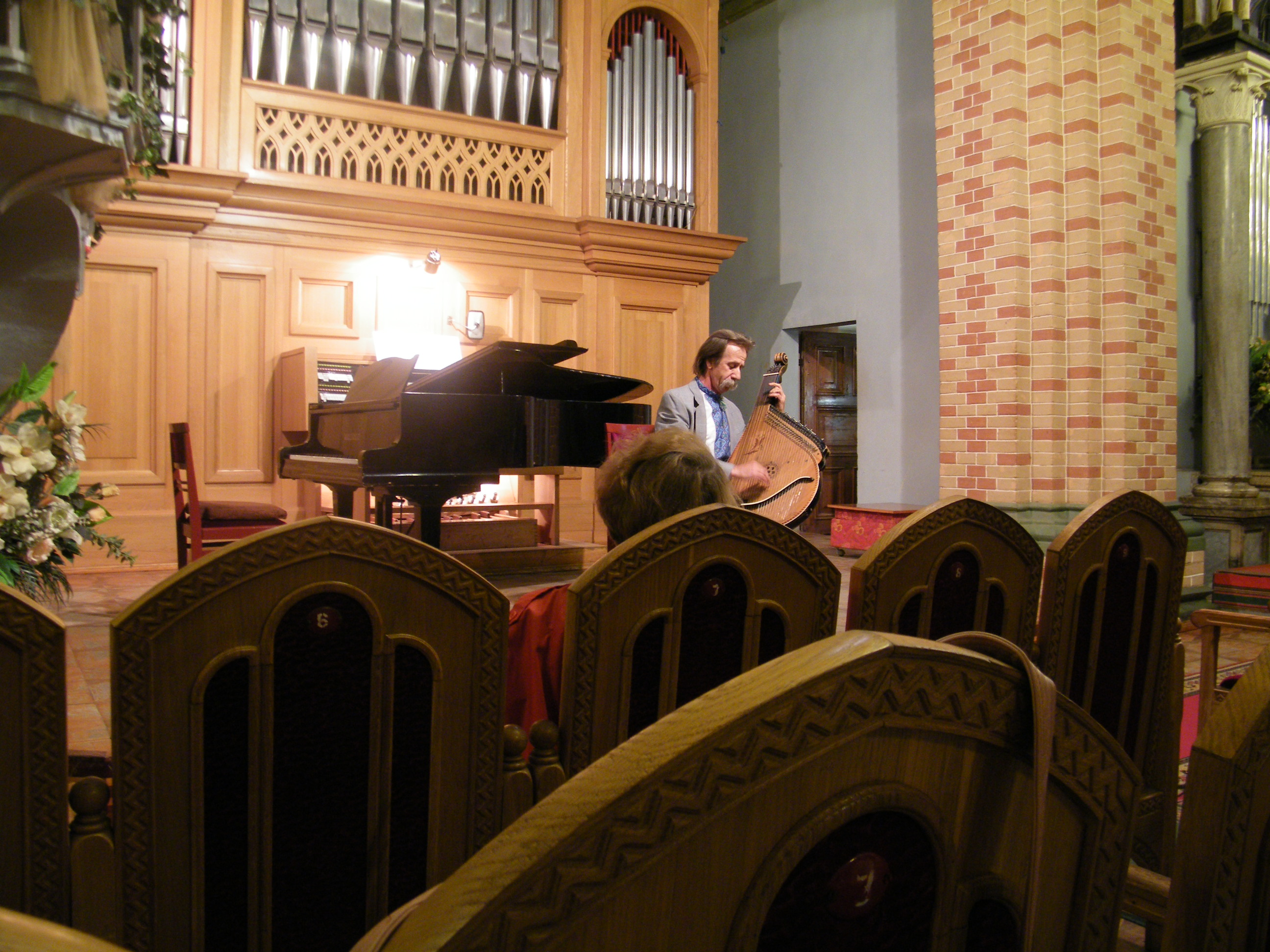 Пиндик Василь Михайлович грає на бандурі